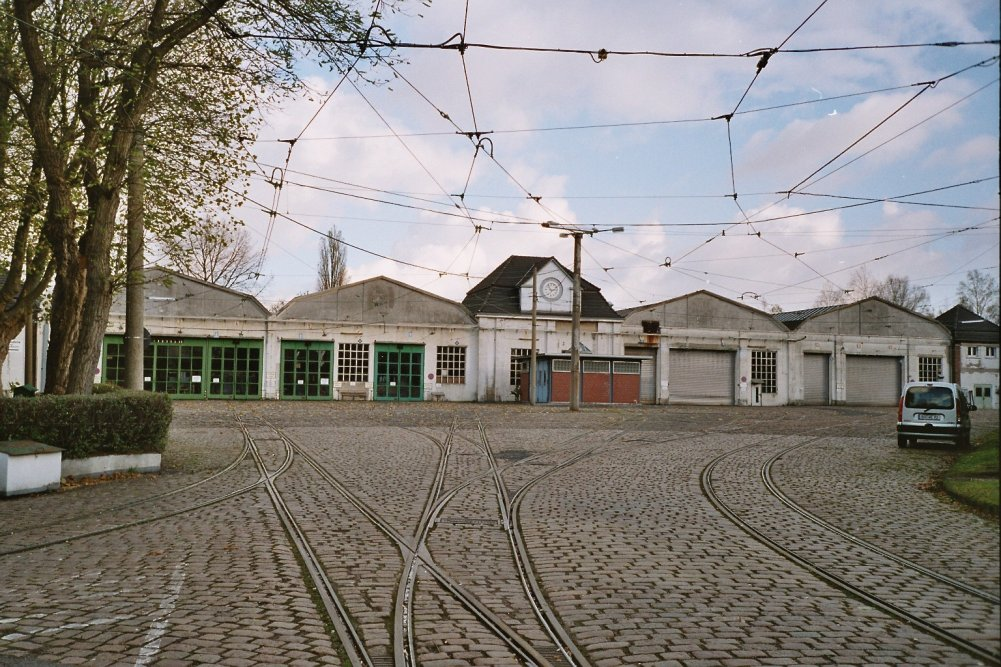 Die Hauptwerkstatt der Bogestra für Straßenbahnen in Bochum-Gerthe, eigenes Bild